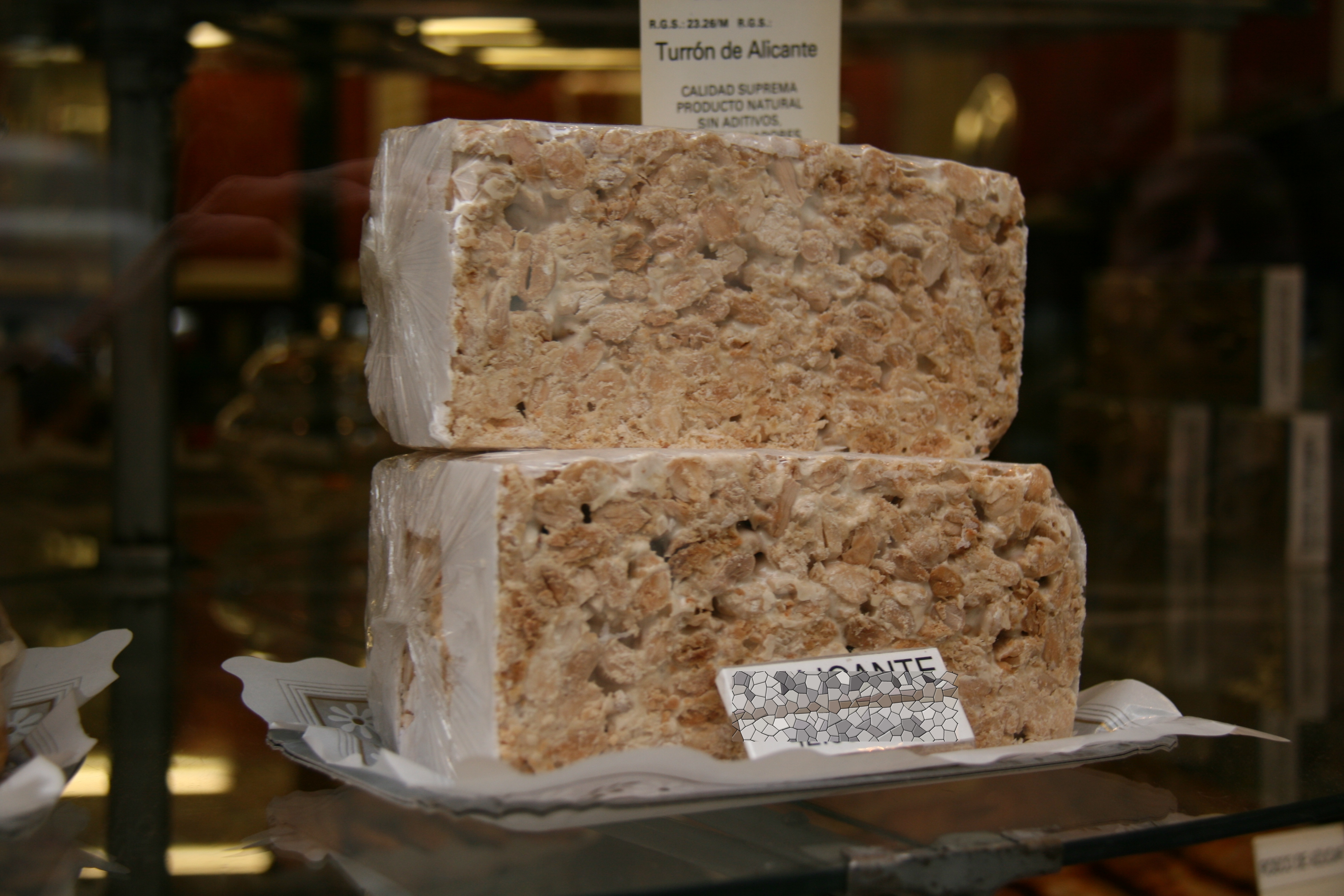 Pieza completa de turrón (Casa Mira)